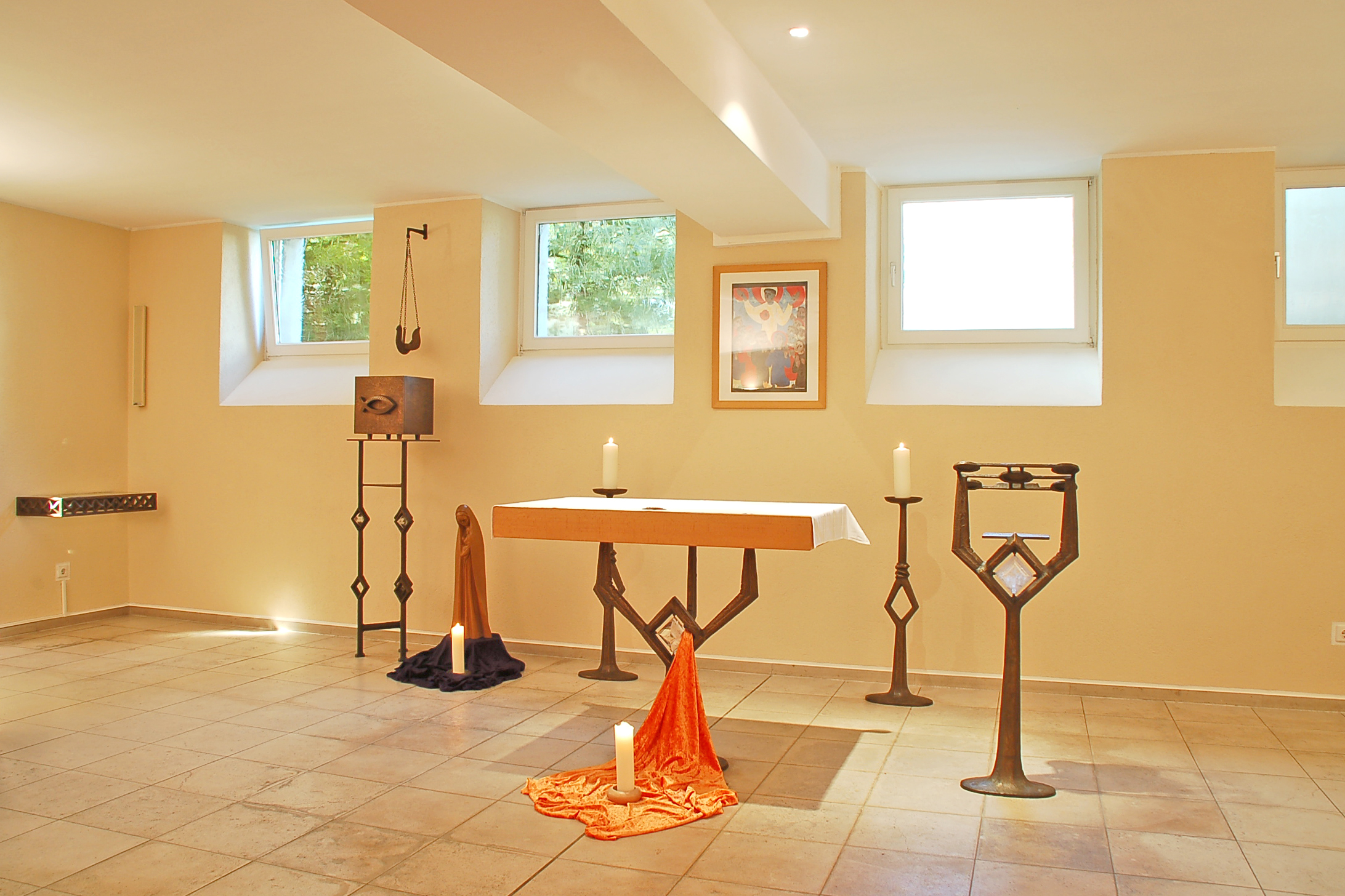 Krypta unter dem Aktar